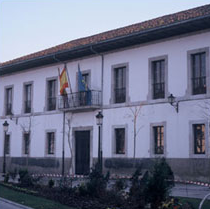 Ayuntamiento de Pravia (Asturias)